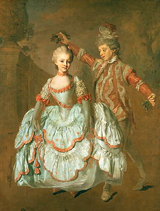 Dancing childrenlabel QS:Lsv,"Dansande barn" label QS:Len,"Dancing children"